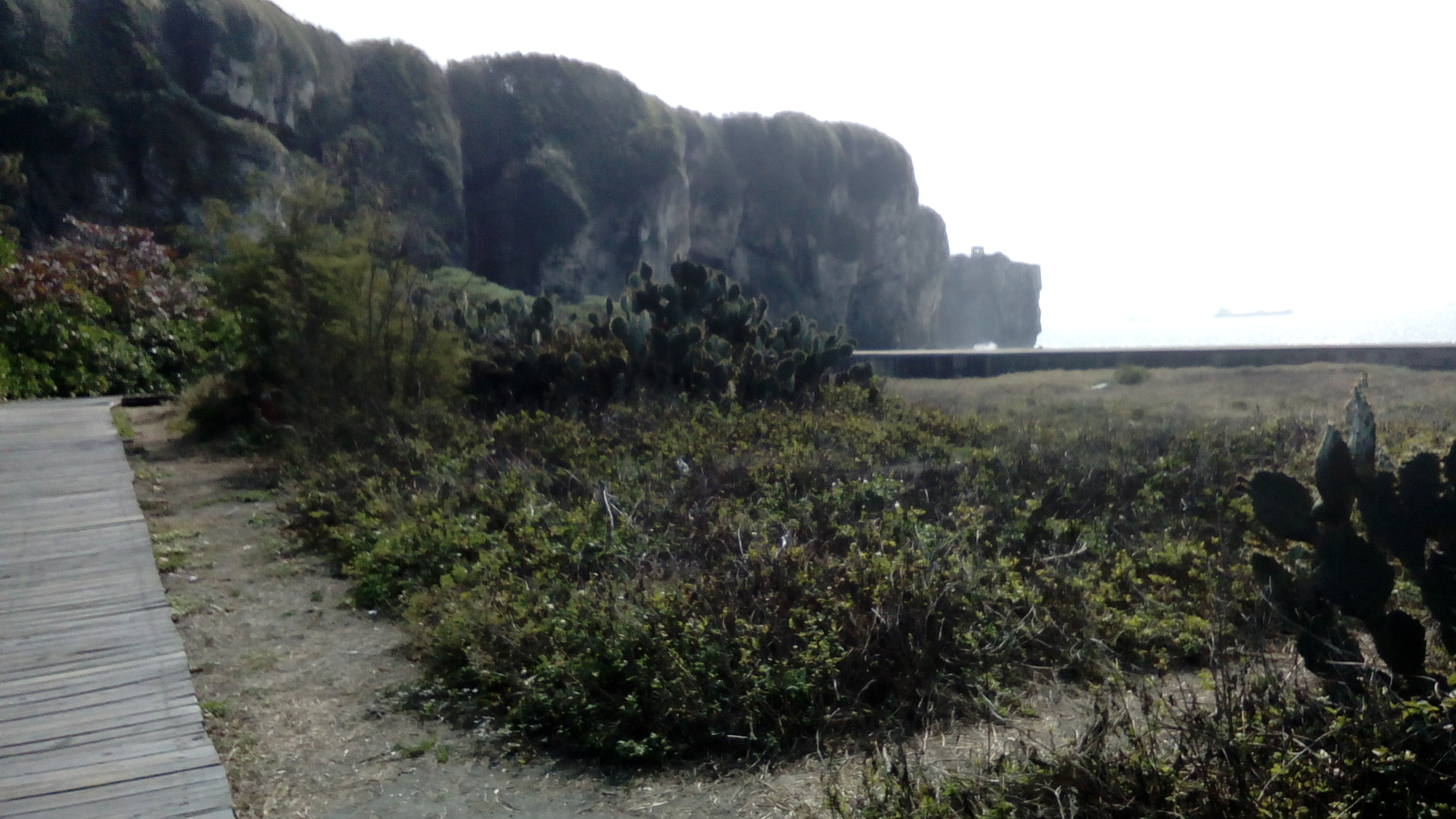 旗津最北點 高雄港北側出口處